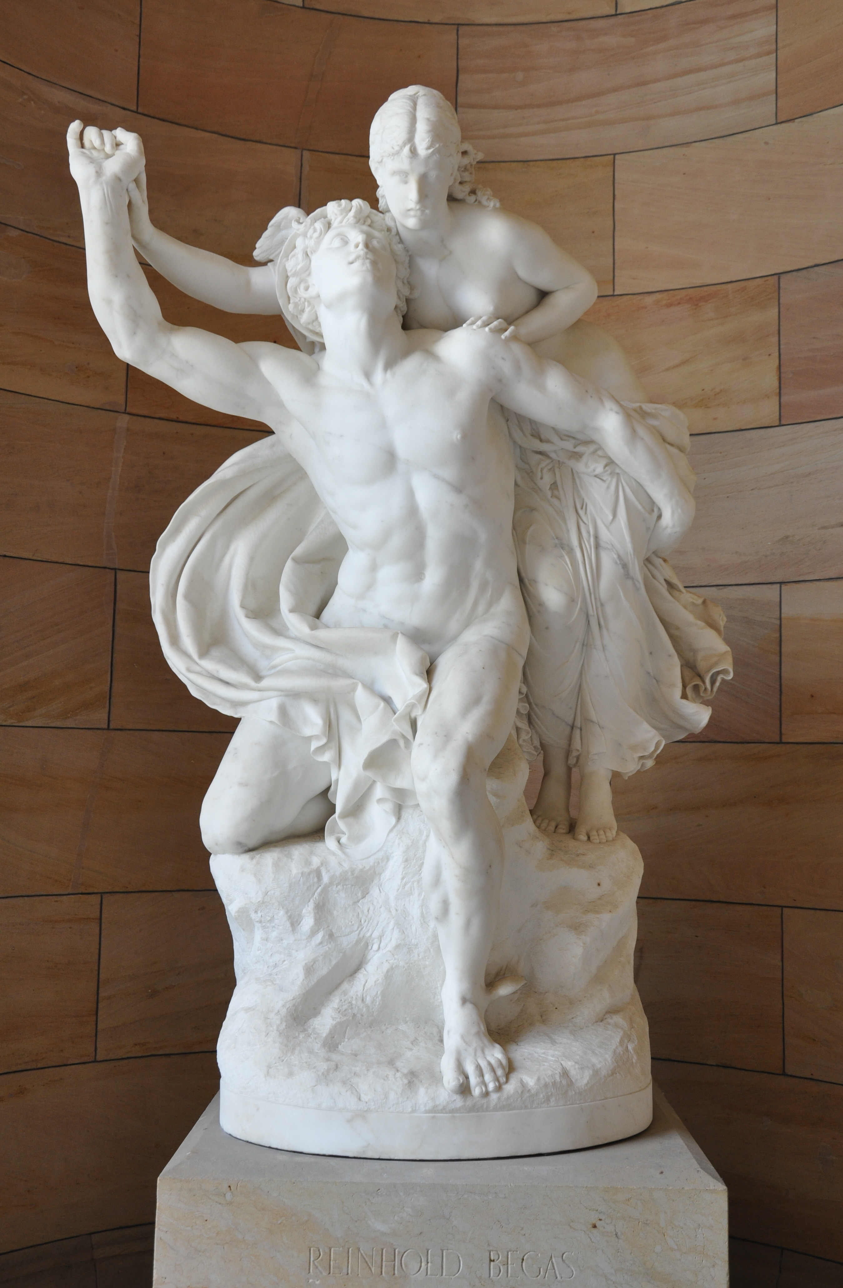 Merkur und Psyche von Reinhold Begas, 1874–1878, Alte Nationalgalerie Berlin (aufgestellt außen im Eingangsbereich)